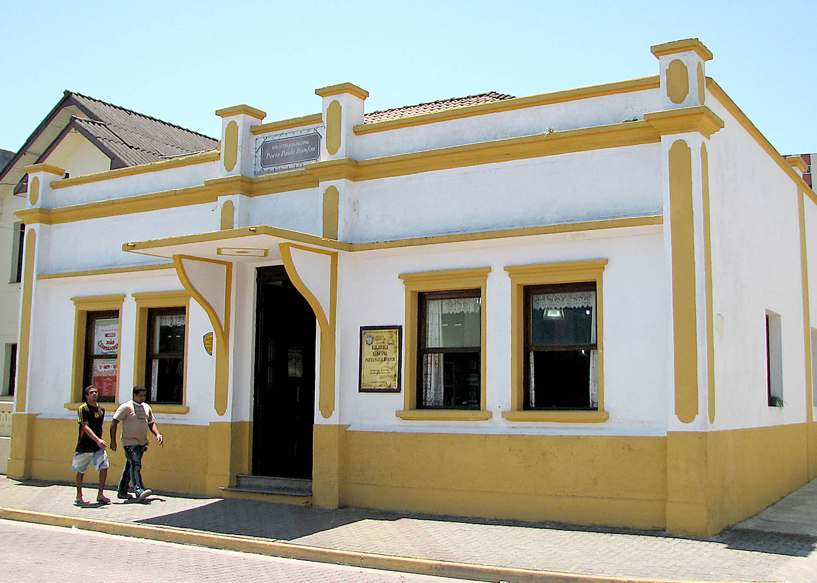 Biblioteca Municipal Poeta Paulo Bomfim, Itanhaém, Brasil